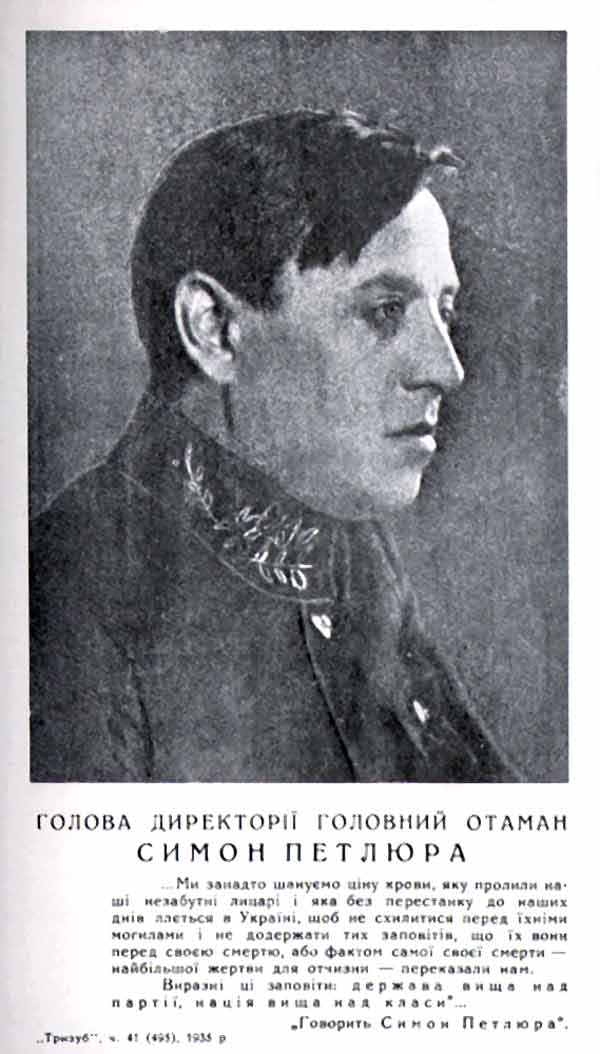 Фото Симона Петлюри. Тижневик "Тризуб" - Париж, 1935